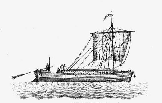 Межеумок